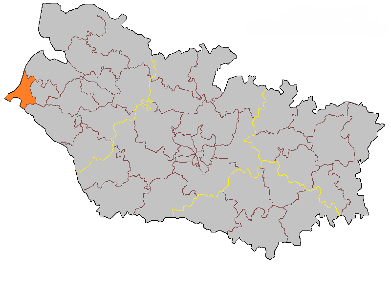 Кантон О в составе департамента Сомма